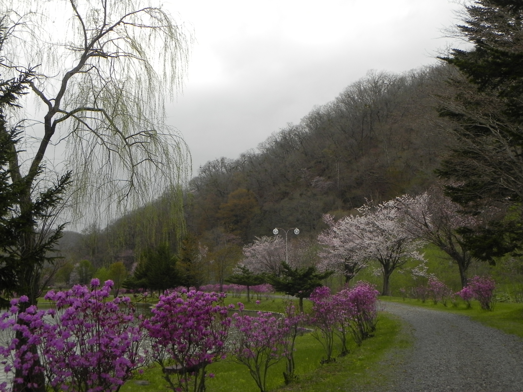 つつじの本別公園（Honbetsu Park）